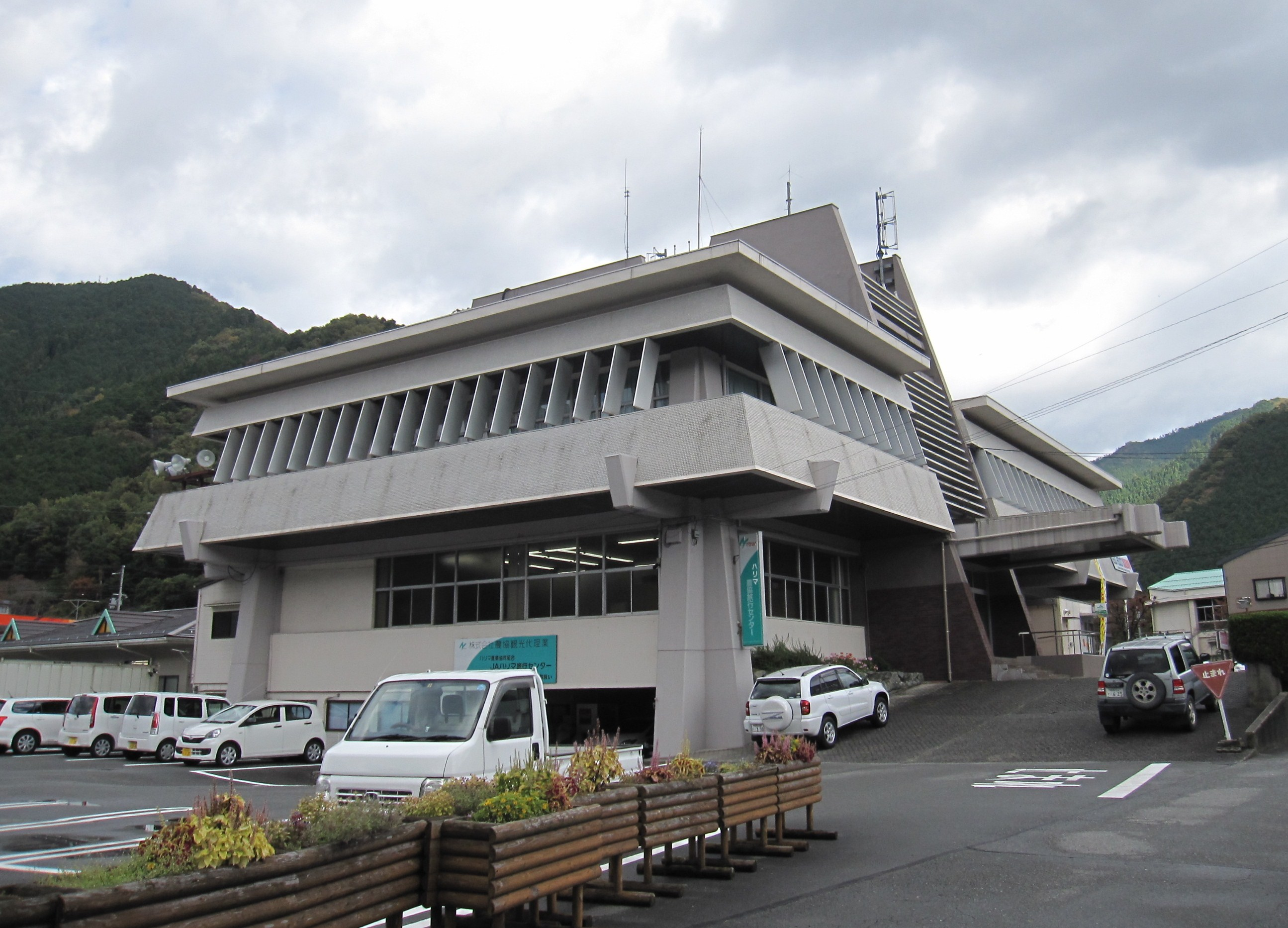 ハリマ農業協同組合本店